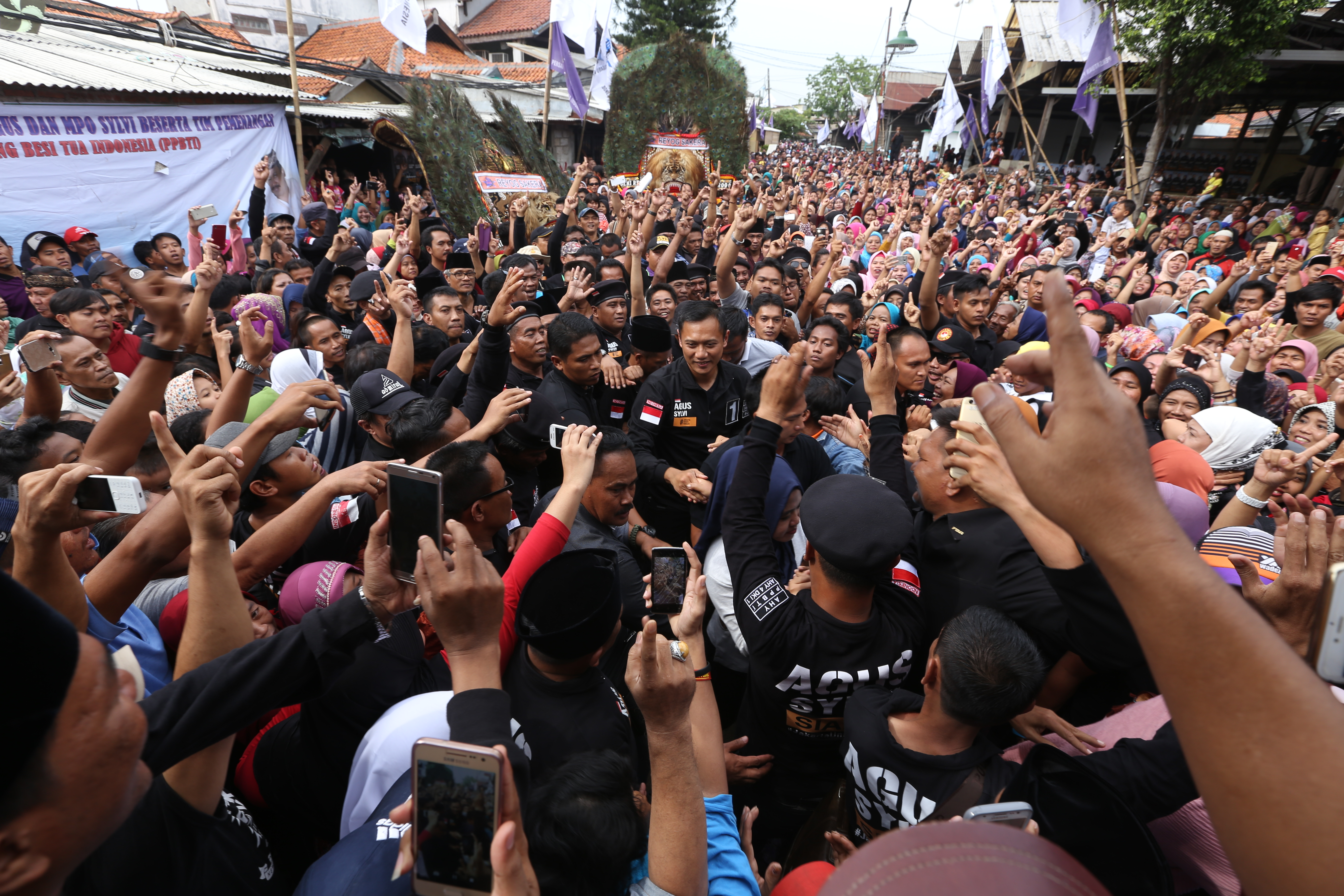 Pilkada DKI 2017 blusukan di Menteng